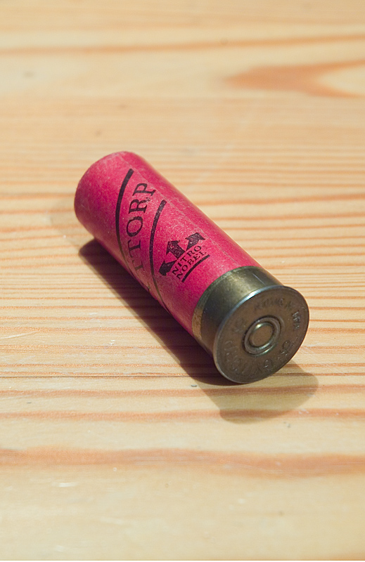 Hagelpatron